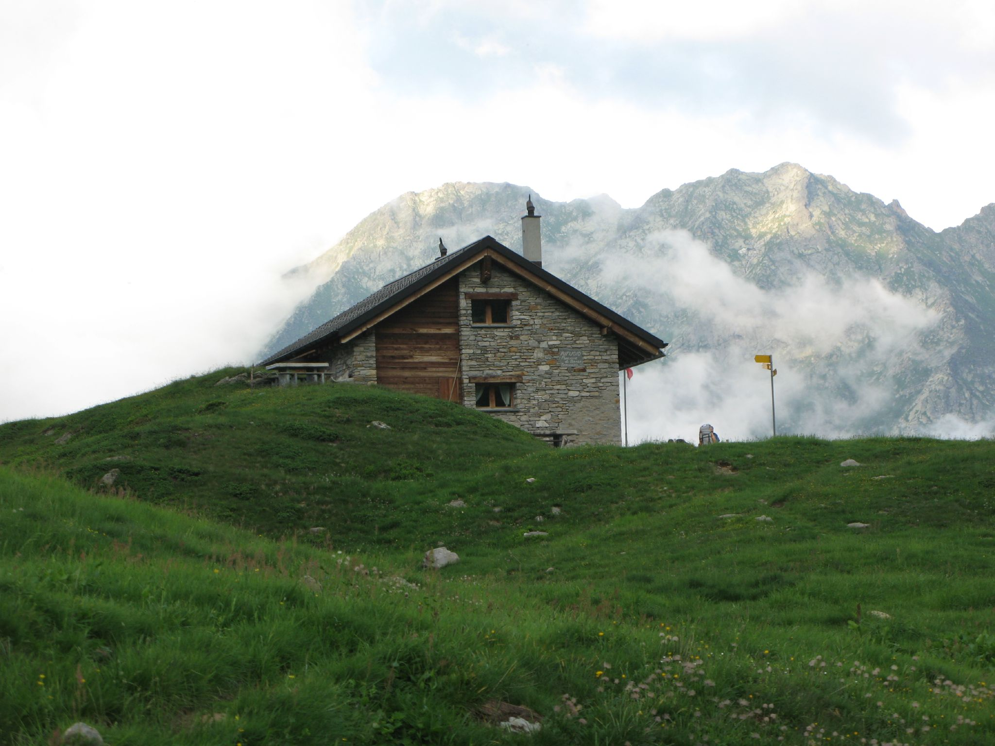 Foto del rifugio Poncione di Braga